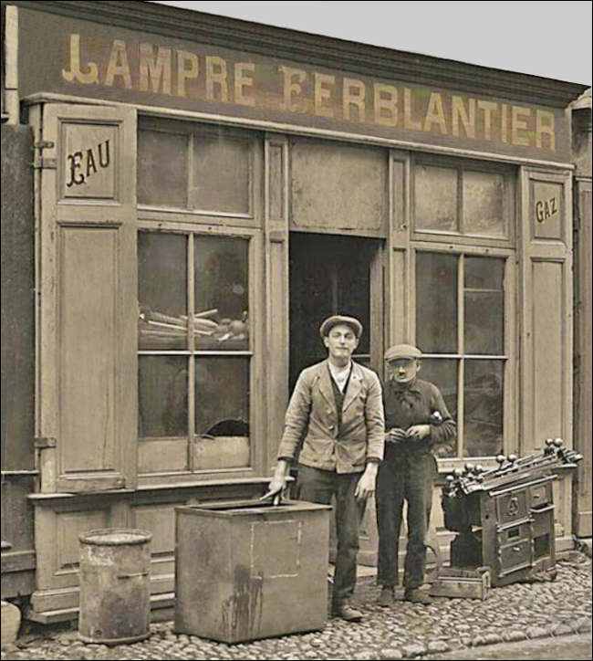 Atelier de plomberie et chauffage - zinguerie - (voir EAU et GAZ) en 1920.